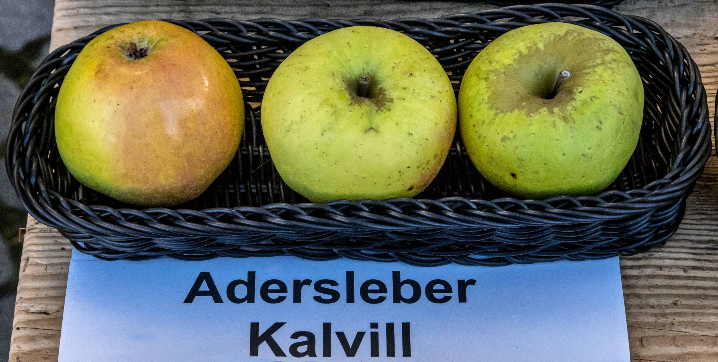 Alte Apfelsorten, von denen es im Badischen noch tragende Bäume gibt. Alle Aufnahmen au dem Oktober 2015